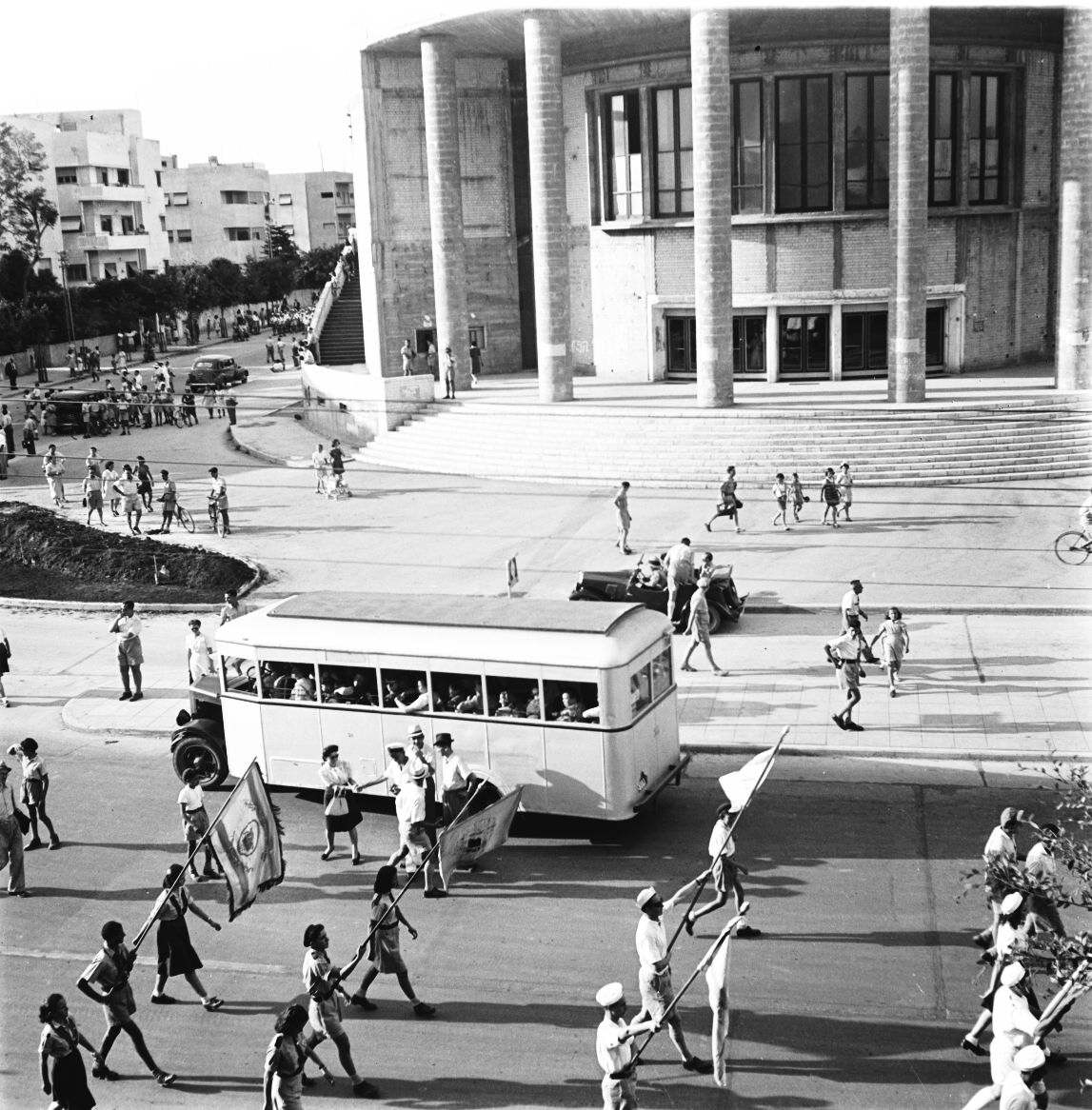 אוסף צילומים של הצלם זולטן קלוגר טווח מספרי התשלילים 27502 - 27629: יום הים - תל אביב